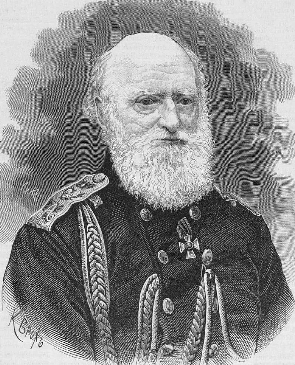 Врангель Фердинанд Петрович, адмирал